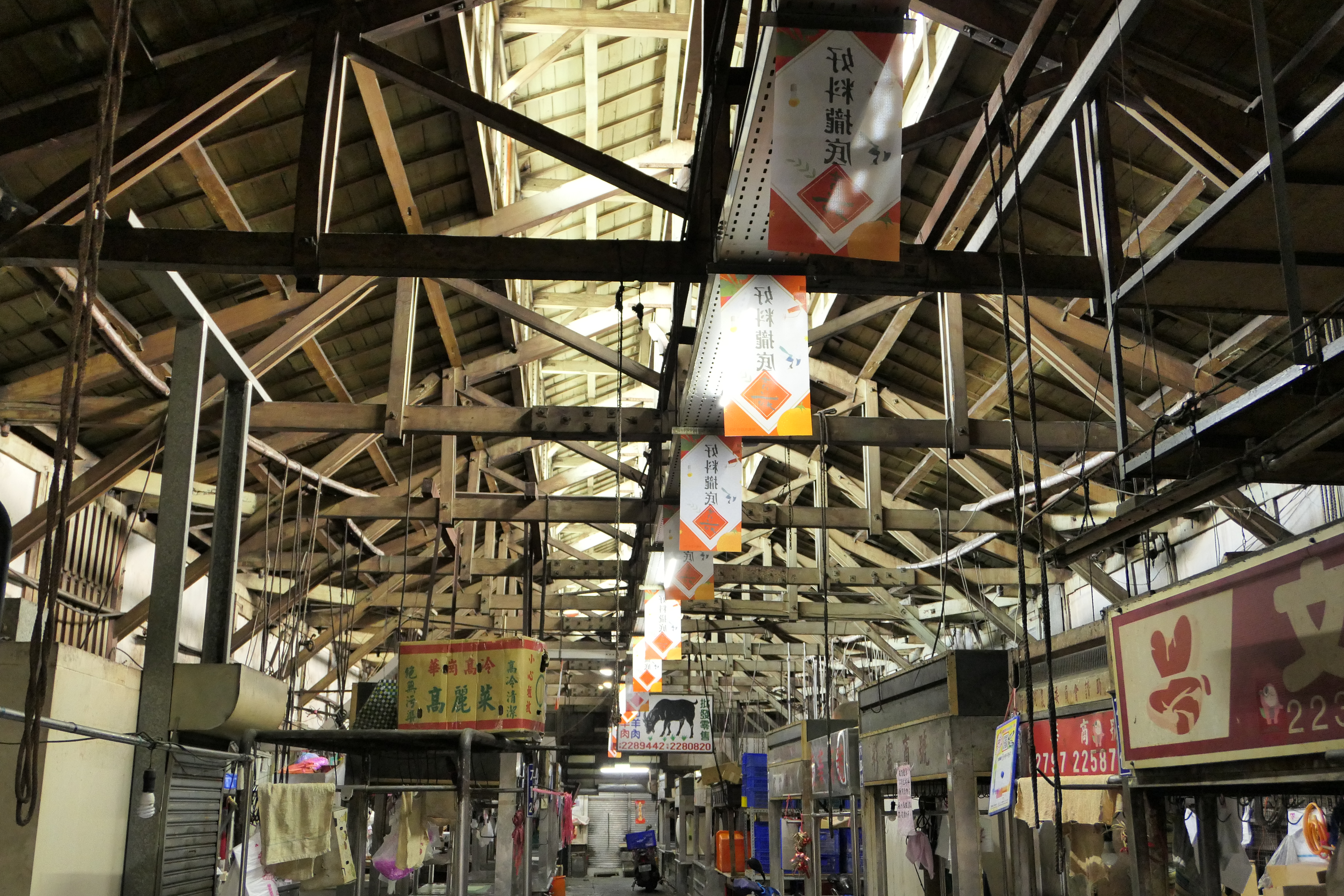 中文（台灣）: 嘉義東市場內部